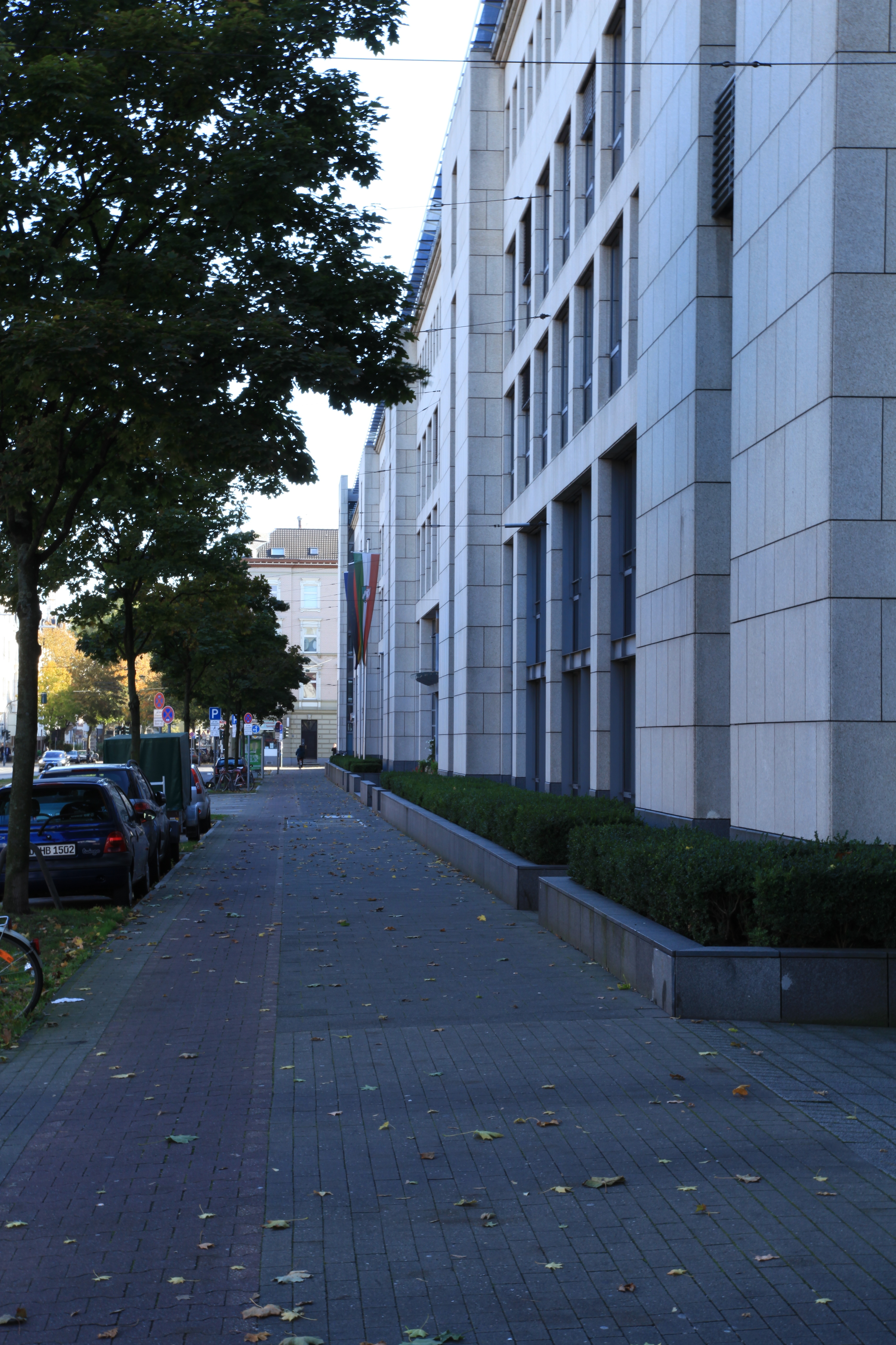 Arbeitsministerium NRW, Fürstenwall 25 in Düsseldorf